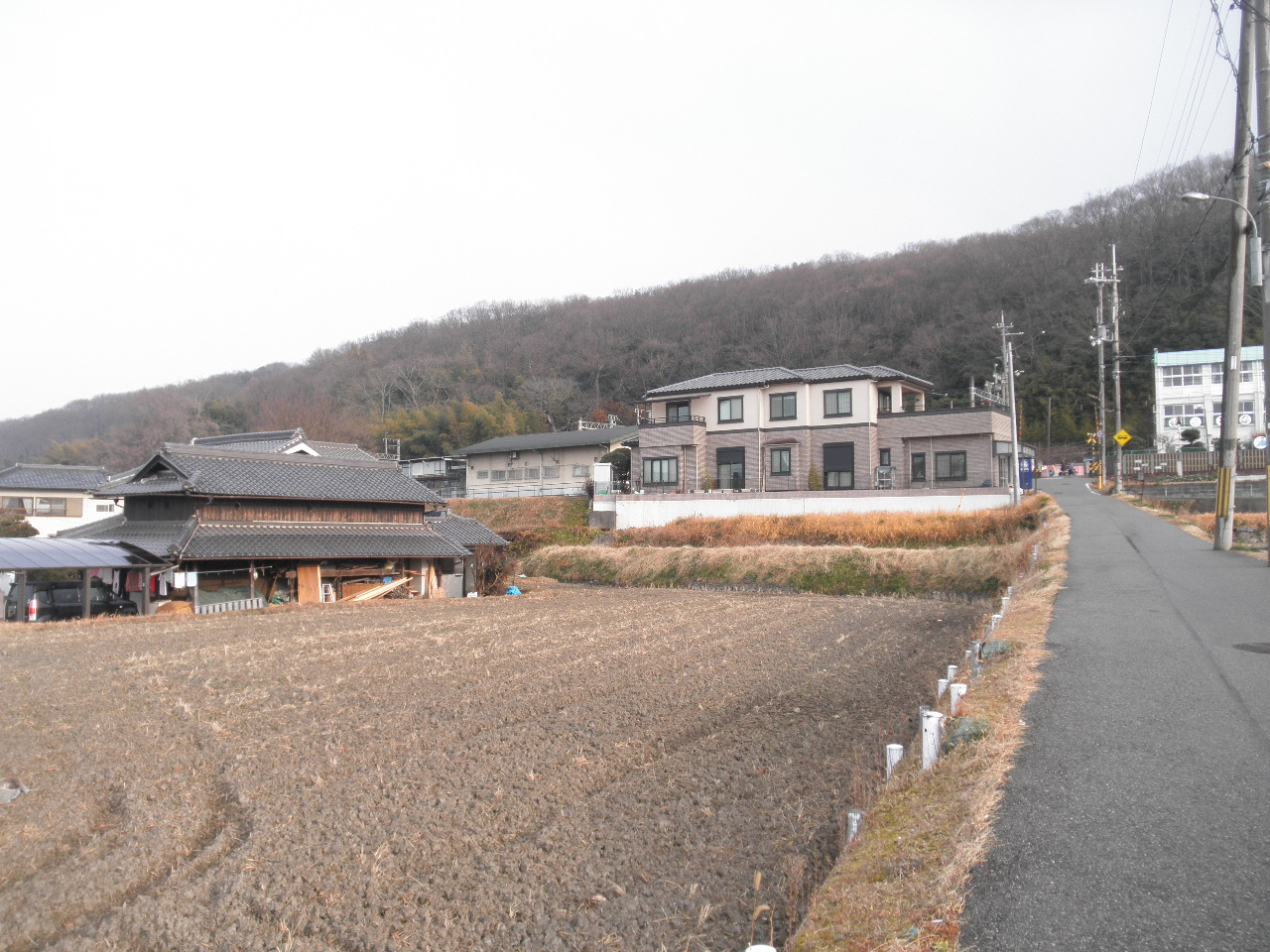 兵庫県神戸市西区押部谷町木津居垣内